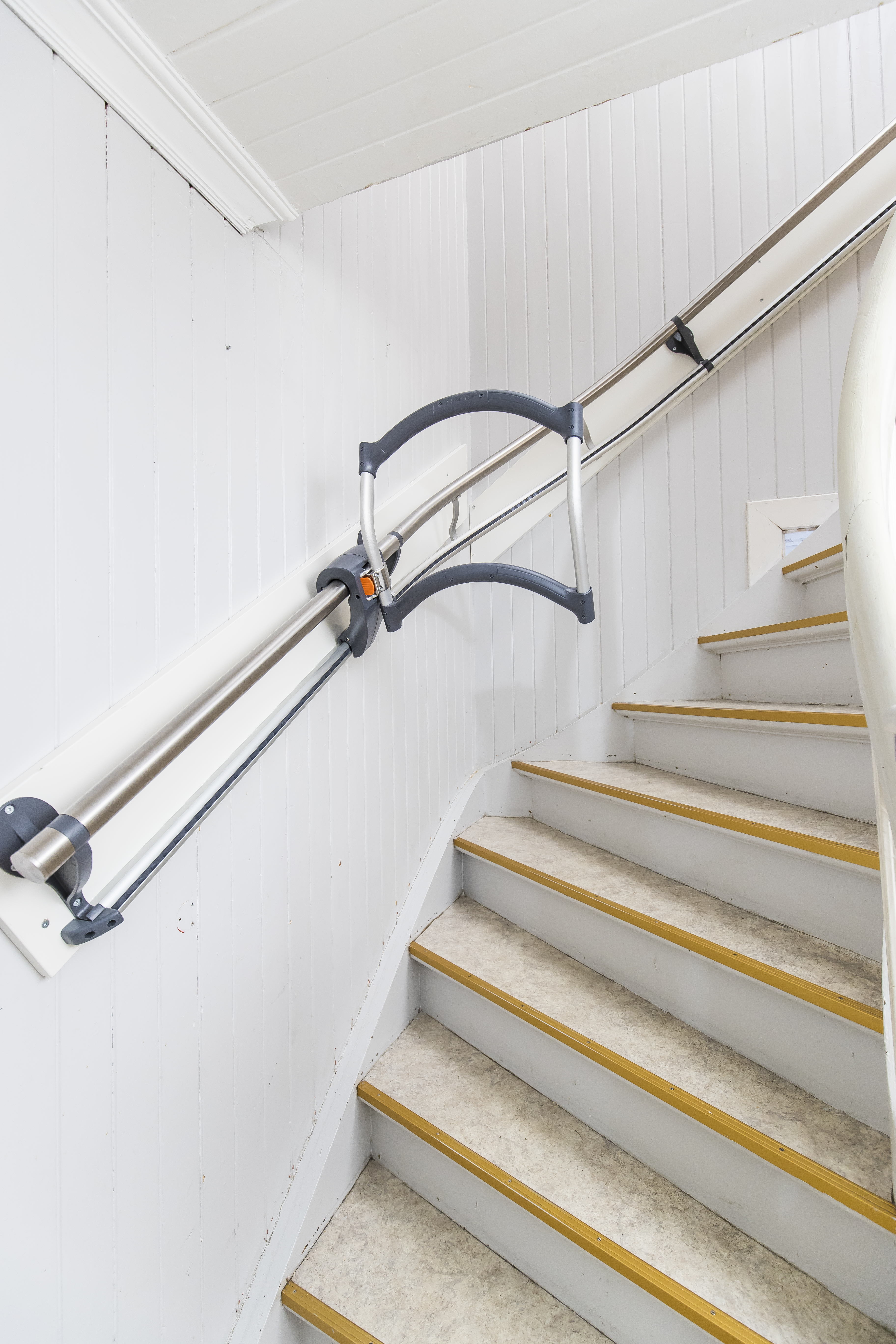 AssiStep gelender og håndtak